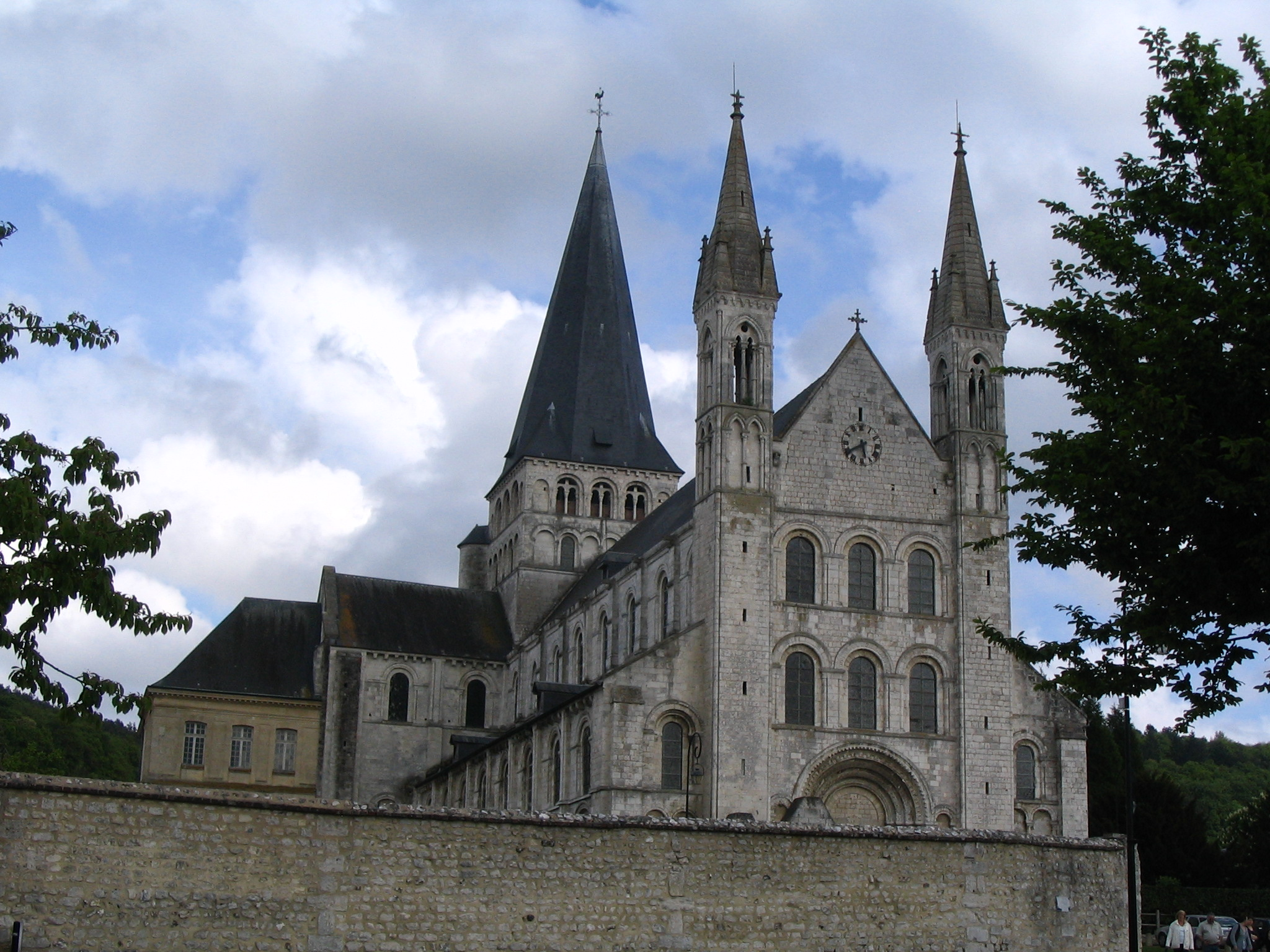 Abbaye St Georges_de_Boscherville à Saint Georges de Boscherville - Seine Maritime- Normandie - France